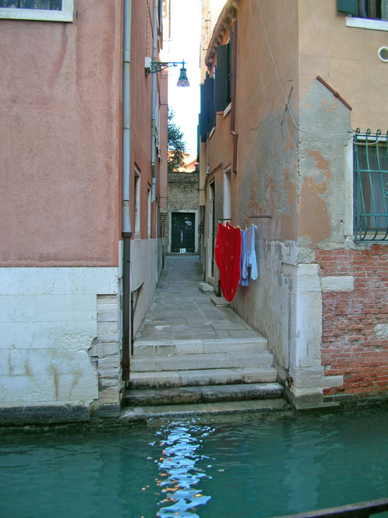 "Riva terminale" (vicolo cieco che sbocca su un canale) a Venezia.